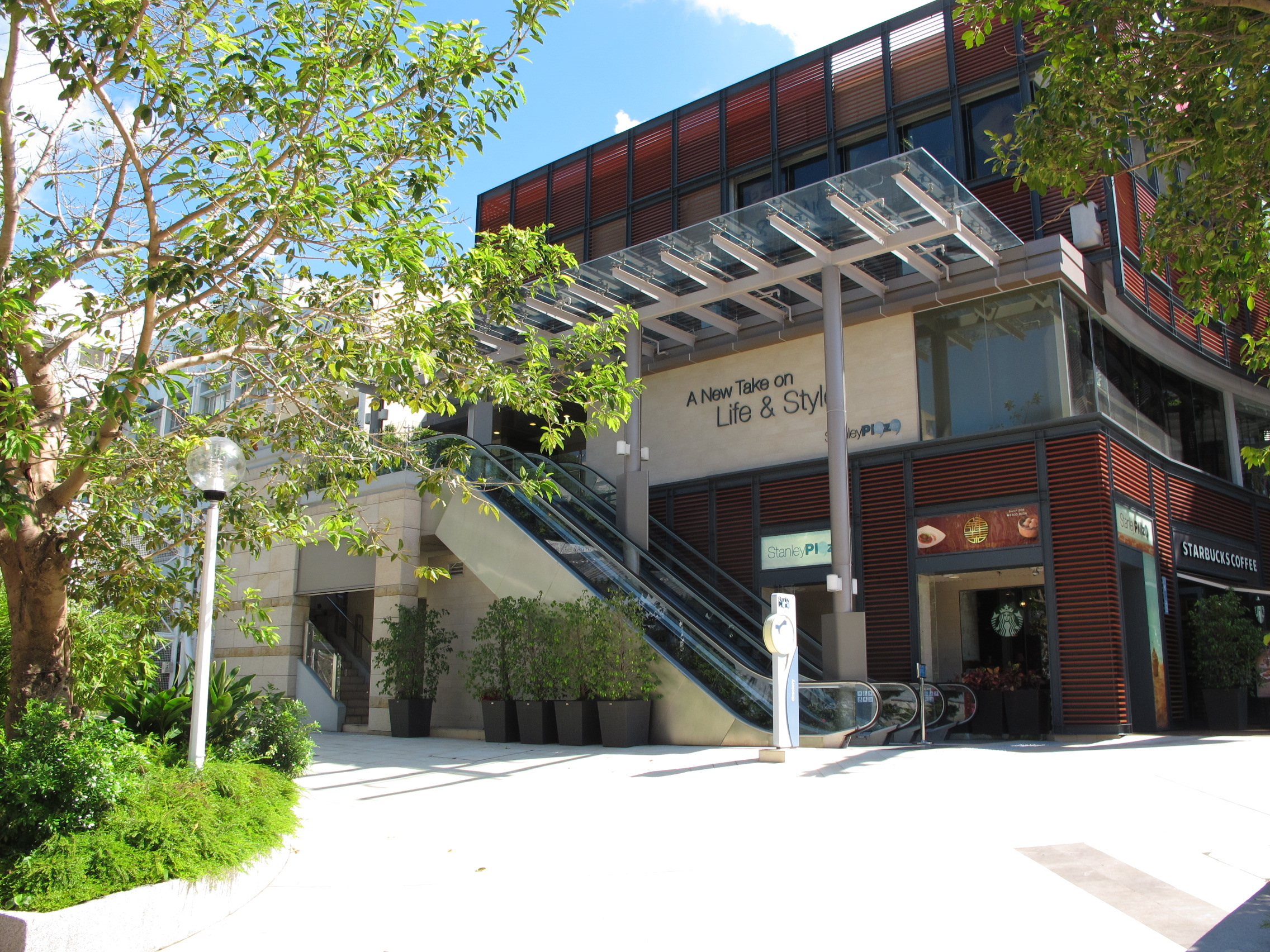 Stanley Plaza